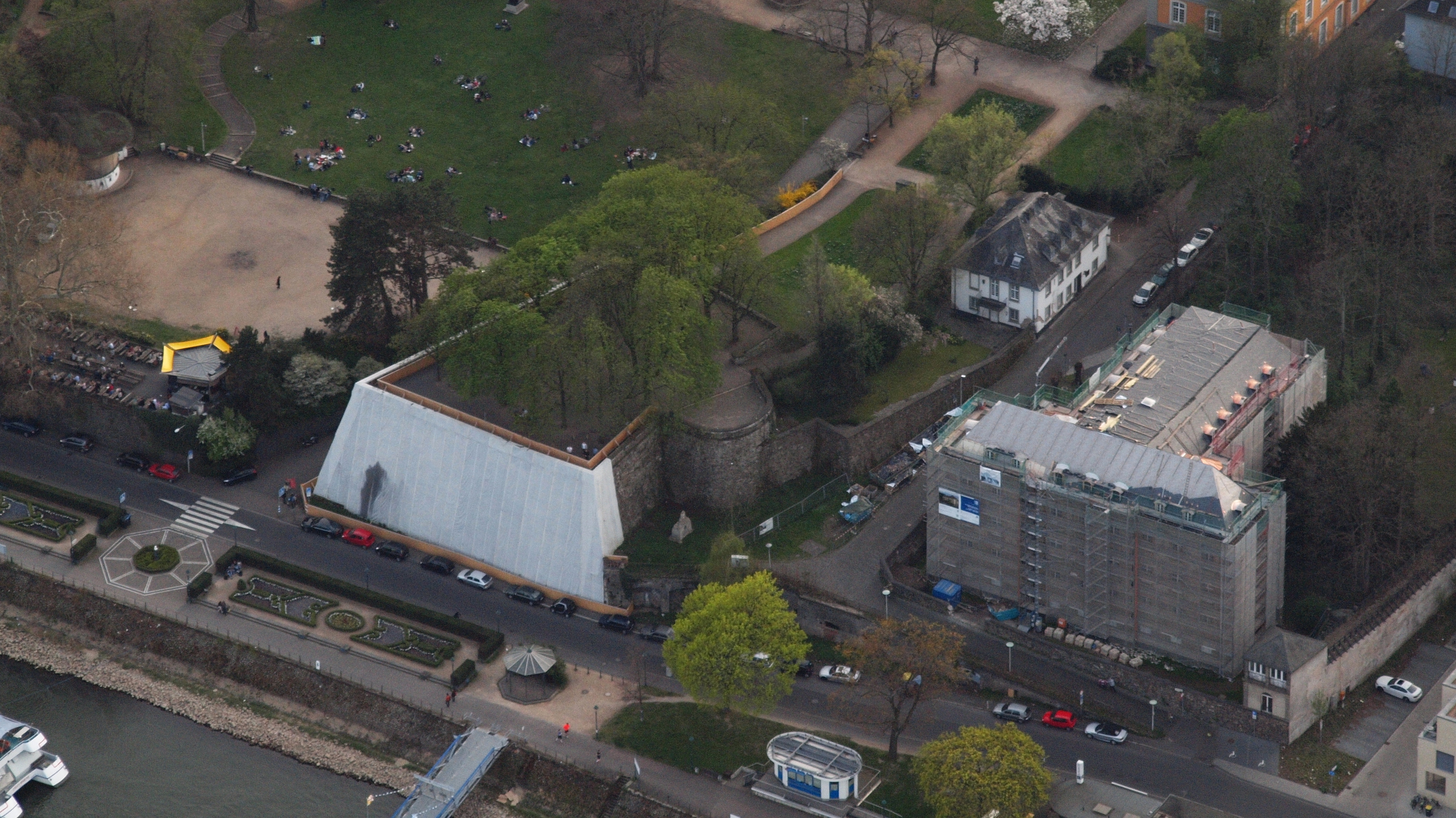 Alter Zoll, Bonn: Luftaufnahme